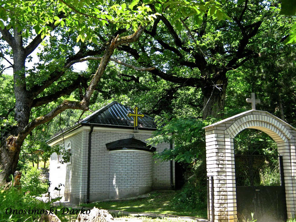 Св Богородица Село Галате